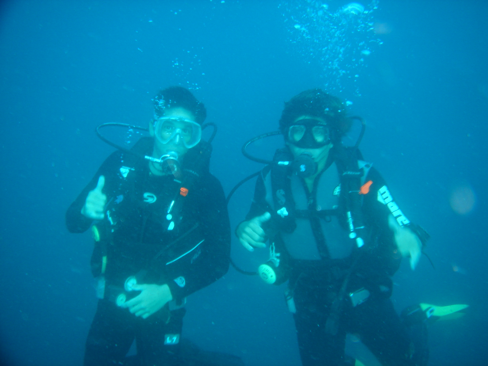 buzos en galapagos a mas de -30m